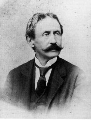 Vittorio Avondo